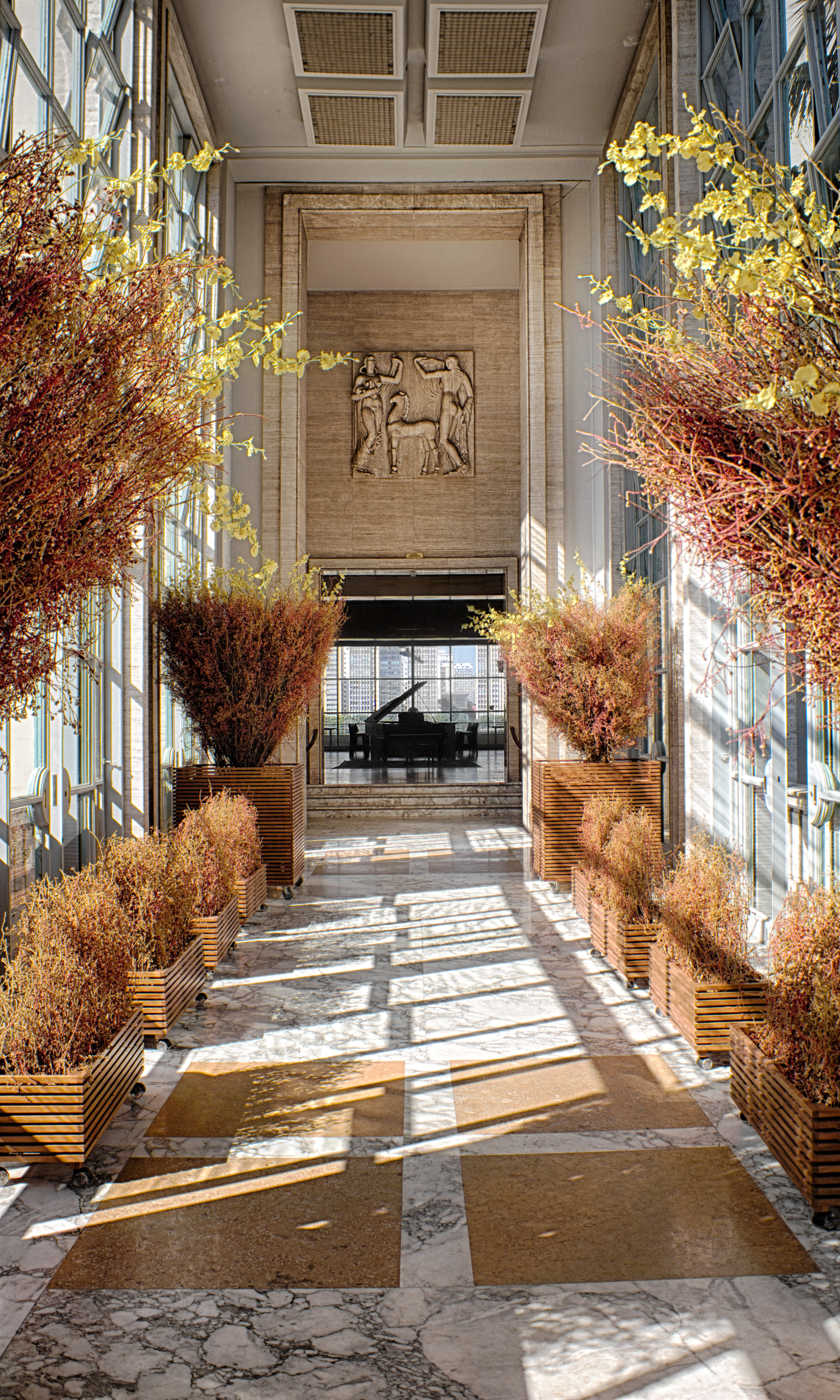 Instalações do Jockey Club de São Paulo.